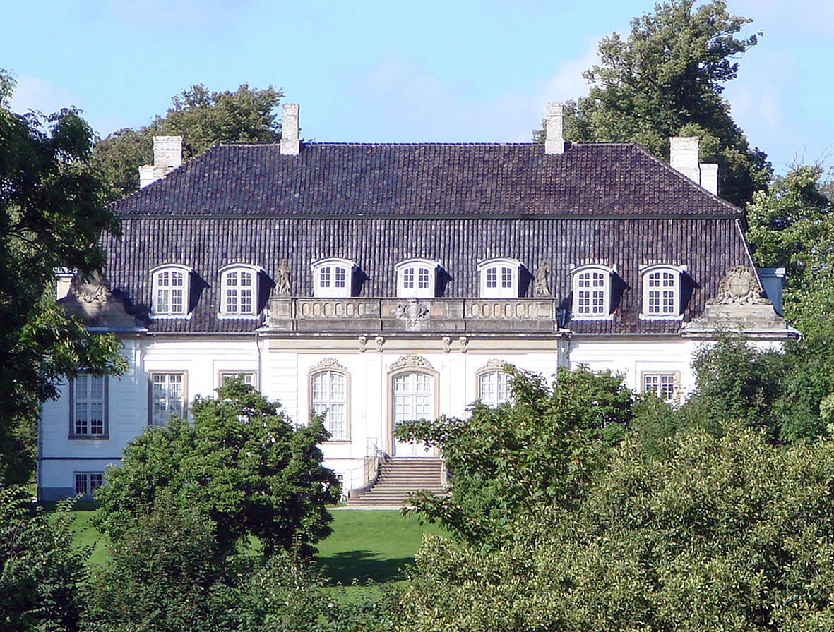 Frederiksdal er en herregård der ligger i Virum Sogn, Sokkelund Herred, København Amt, Region Hovedstaden, Lyngby-Tårbæk Kommune. Hovedbygningen er opført i 1744-1745 ved N. Eigtved og ombygget i 1752-1753 ved J. G. Rosenbergda:Frederiksdal